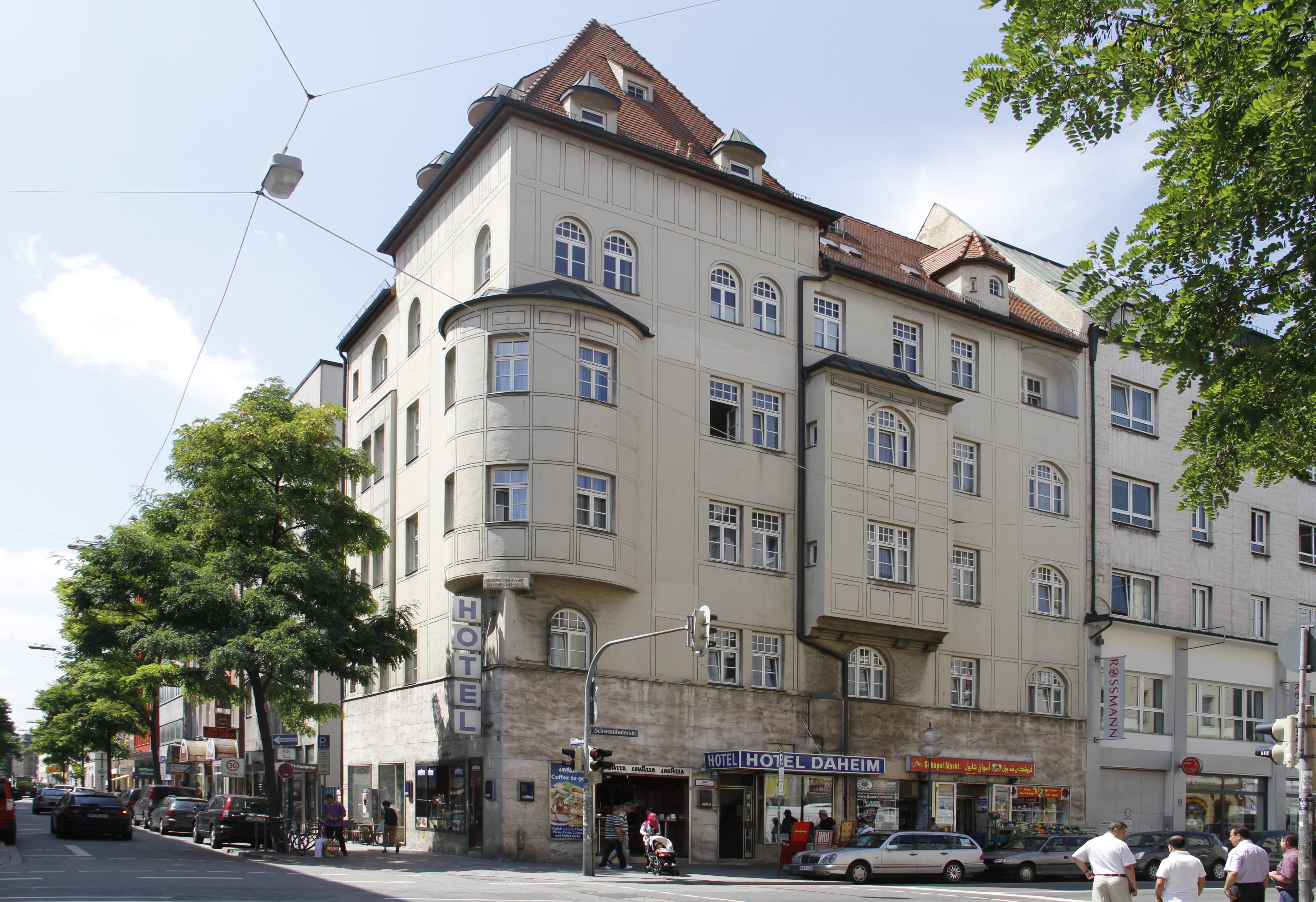 Schillerstrasse 20, München Ludwigsvorstadt. Mietshaus im Jugendstil von 1905. Erbaut von Architekt August Zeh für den Fleischhändler Friedrich Gunzert. Die ursprünglich reich verzierte Fassade wurde nach dem Zweiten Weltkrieg vereinfacht wiederhergestellt.